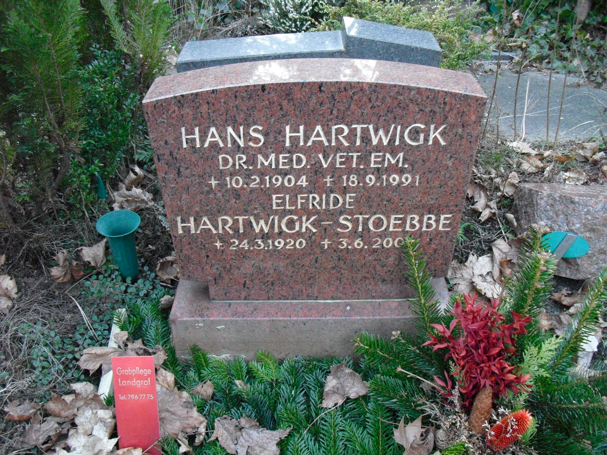 Grab des deutschen Veterinärs Hans Hartwigk auf dem Friedhof Steglitz